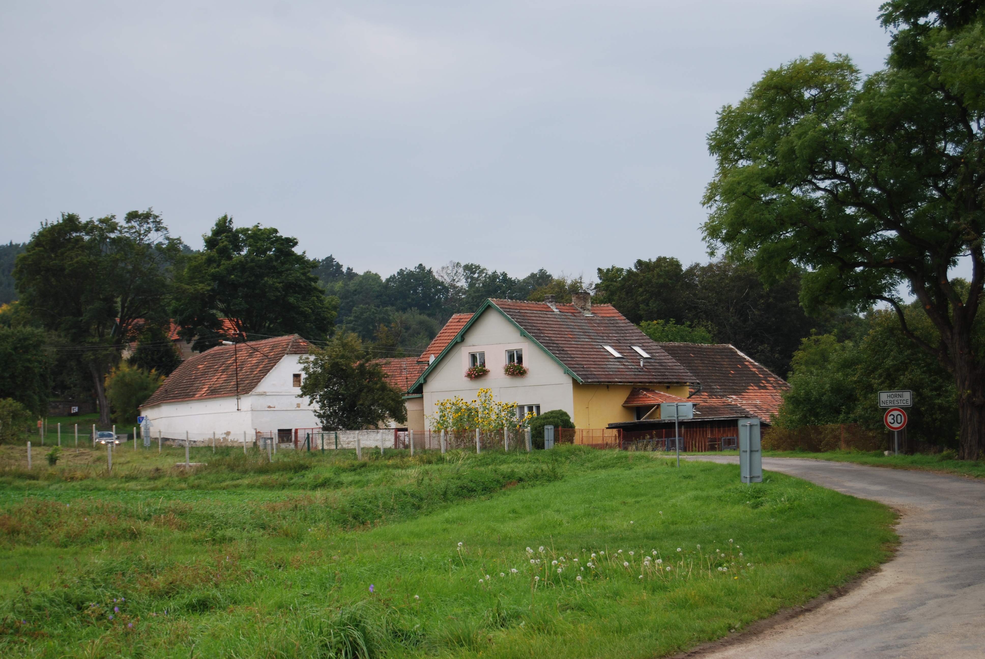 Pohled na obec. Horní Nerestce je část obce Nerestce v okrese Písek. Česká republika.